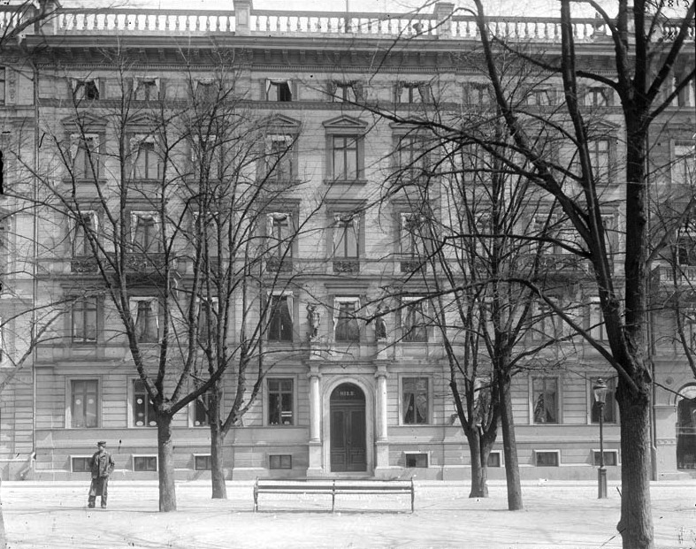 Davidsonska huset, Kungsträdgårdsgatan 2B (rivet 1902)